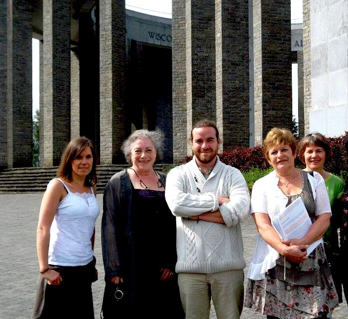 Echange Ardenne-Bretagne du Centre Arthurien.